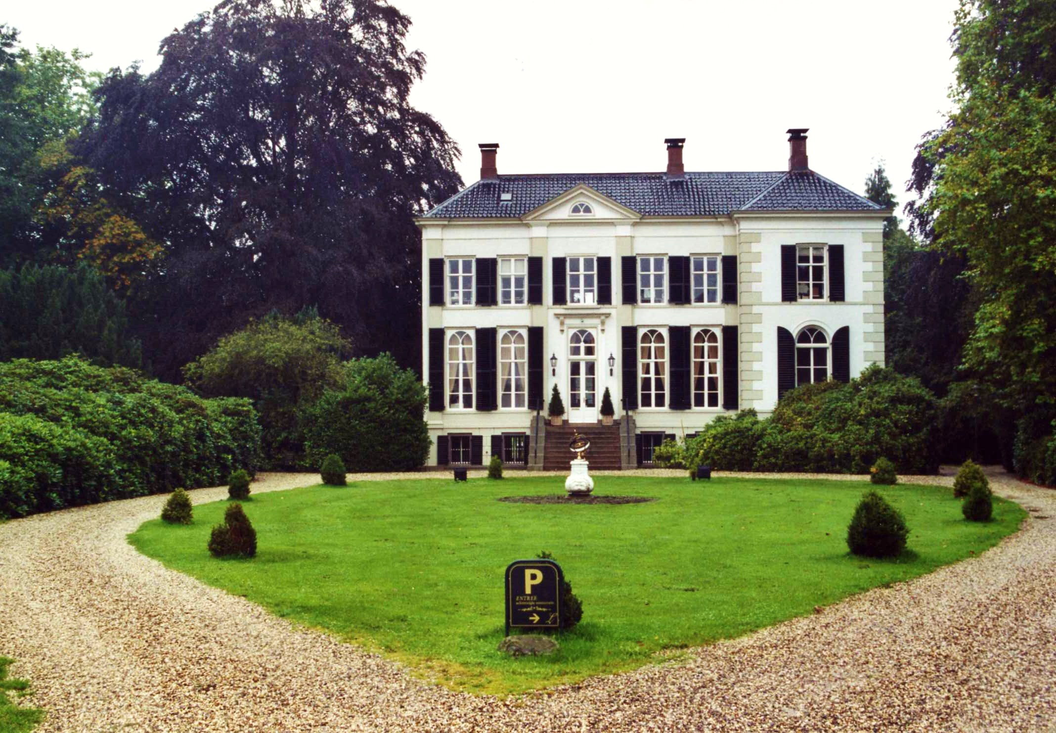 Huis 't Laar te Ommen.